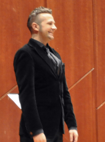 Max Emanuel Cencic